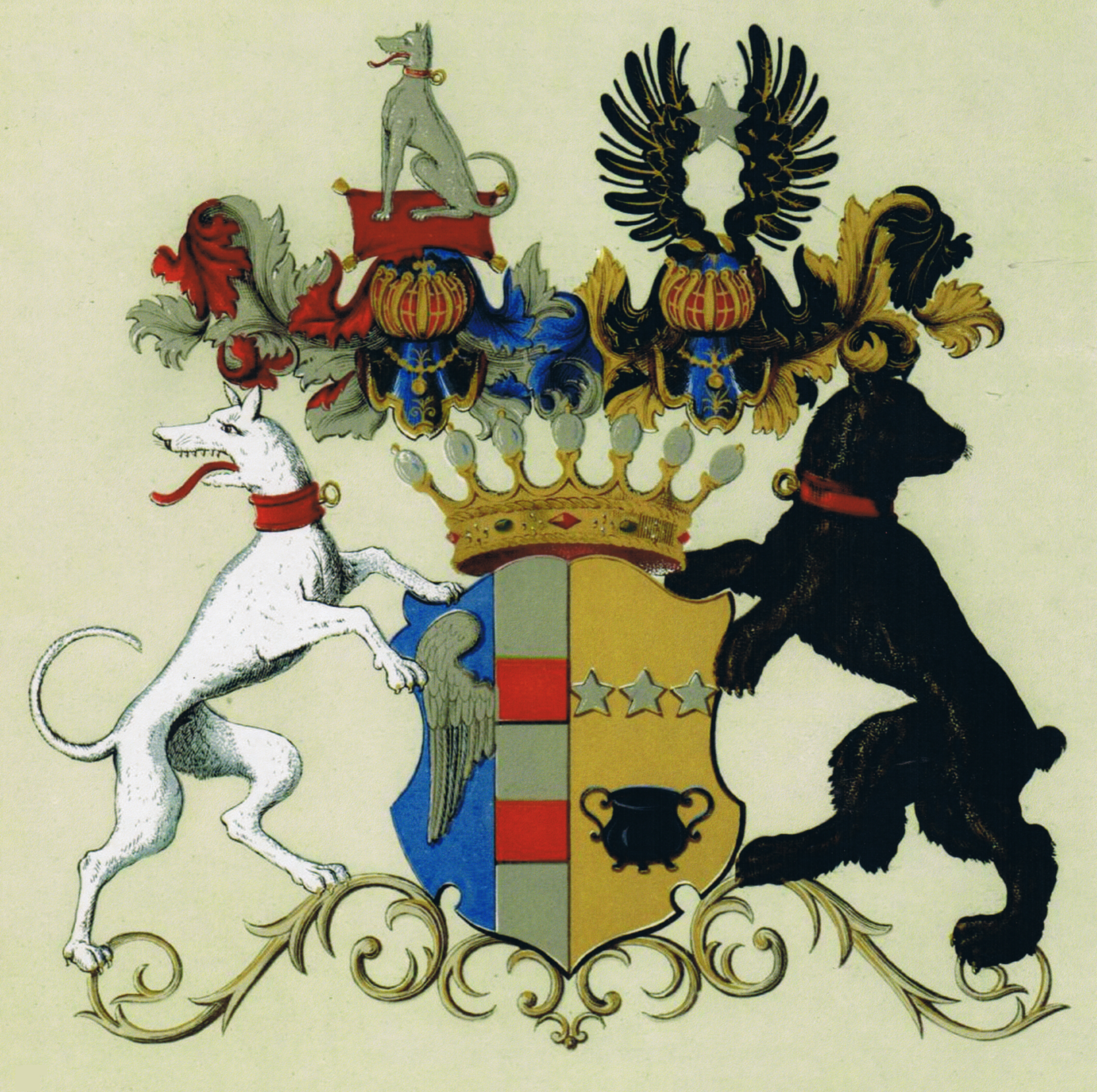 Wappen Ahlefeldt Baron von Dehn aus dem Jahr 1783